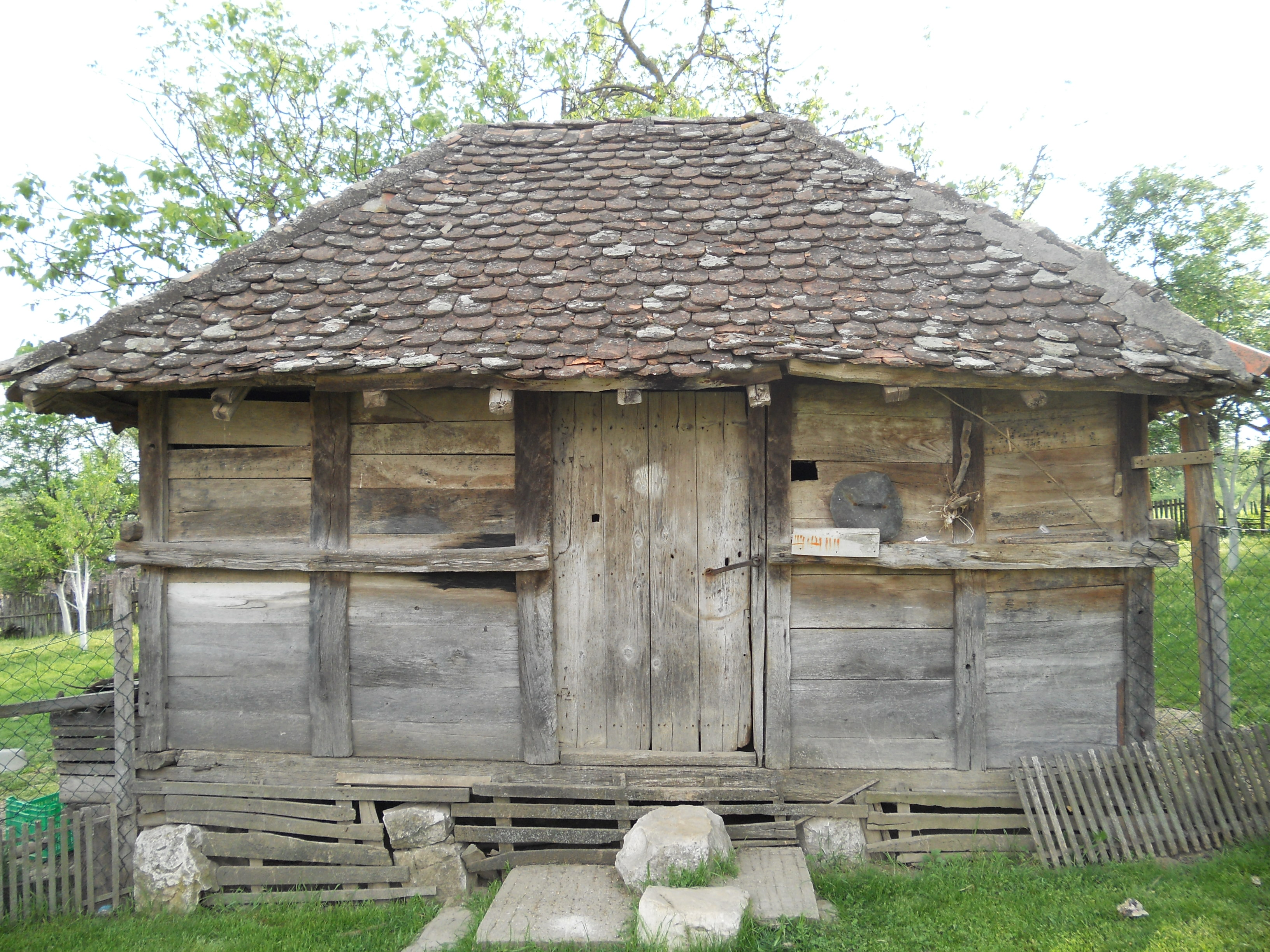 двориште Илића, Јаловик